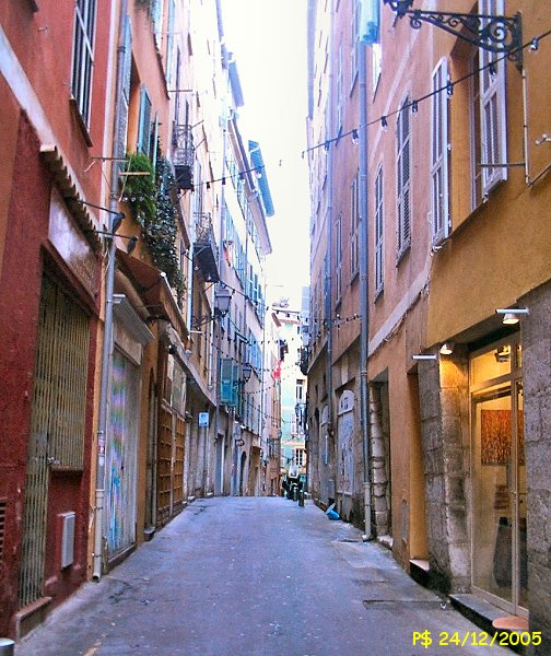 Historické jádro města Nice, Francie